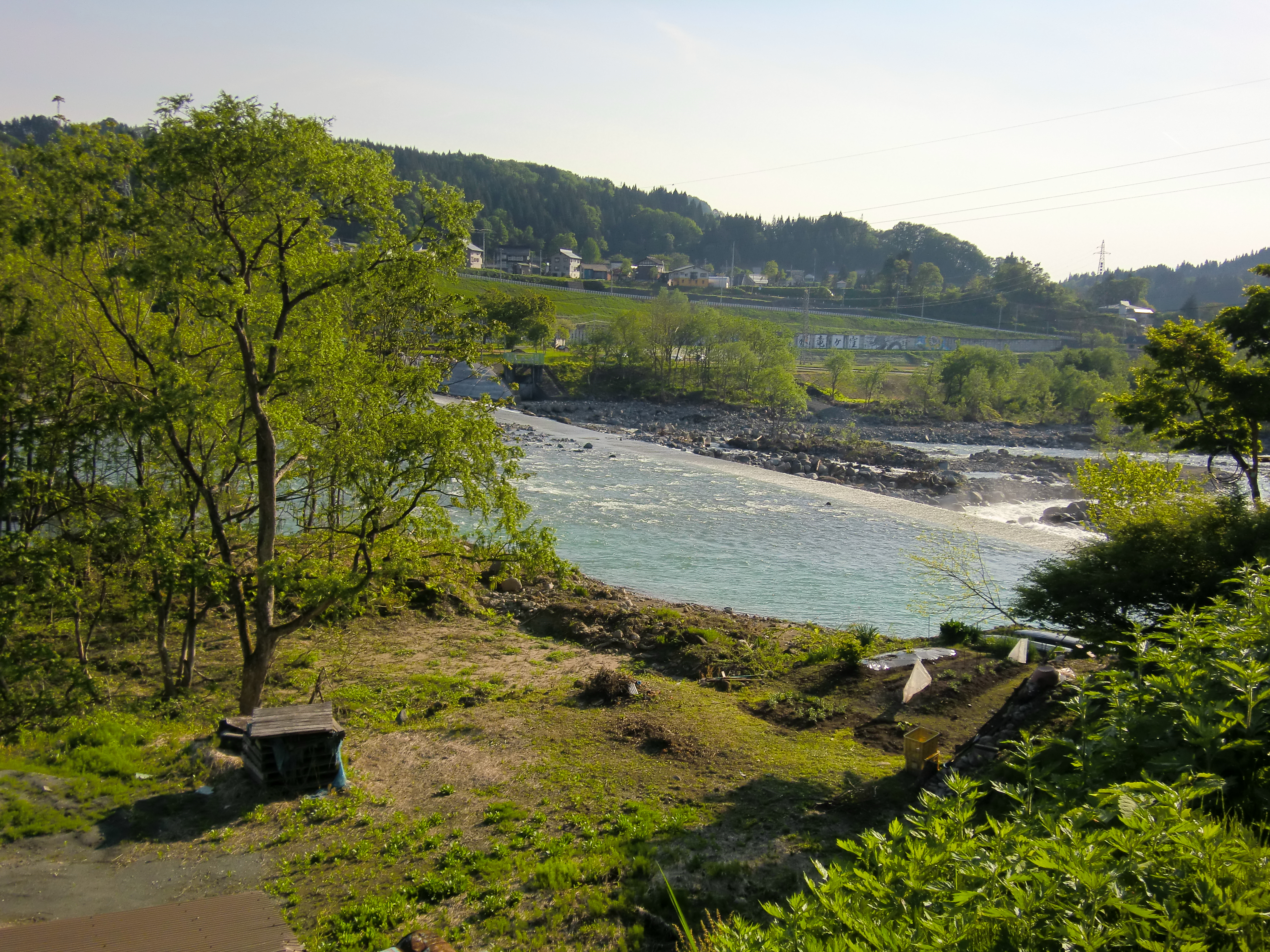 津南中等教育学校からみた中津川